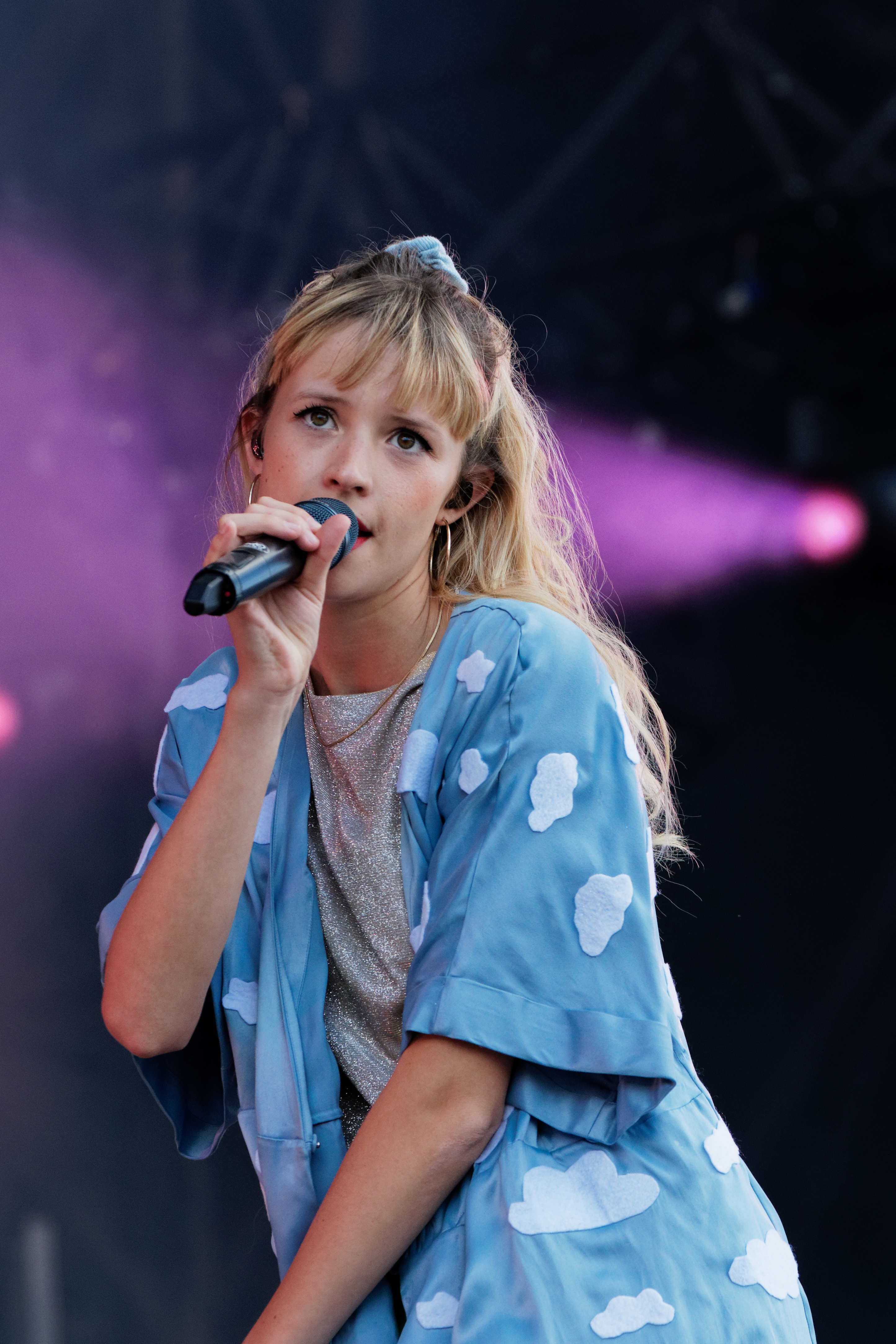 Angèle en concert lors du festival des vieilles charrues 2018.